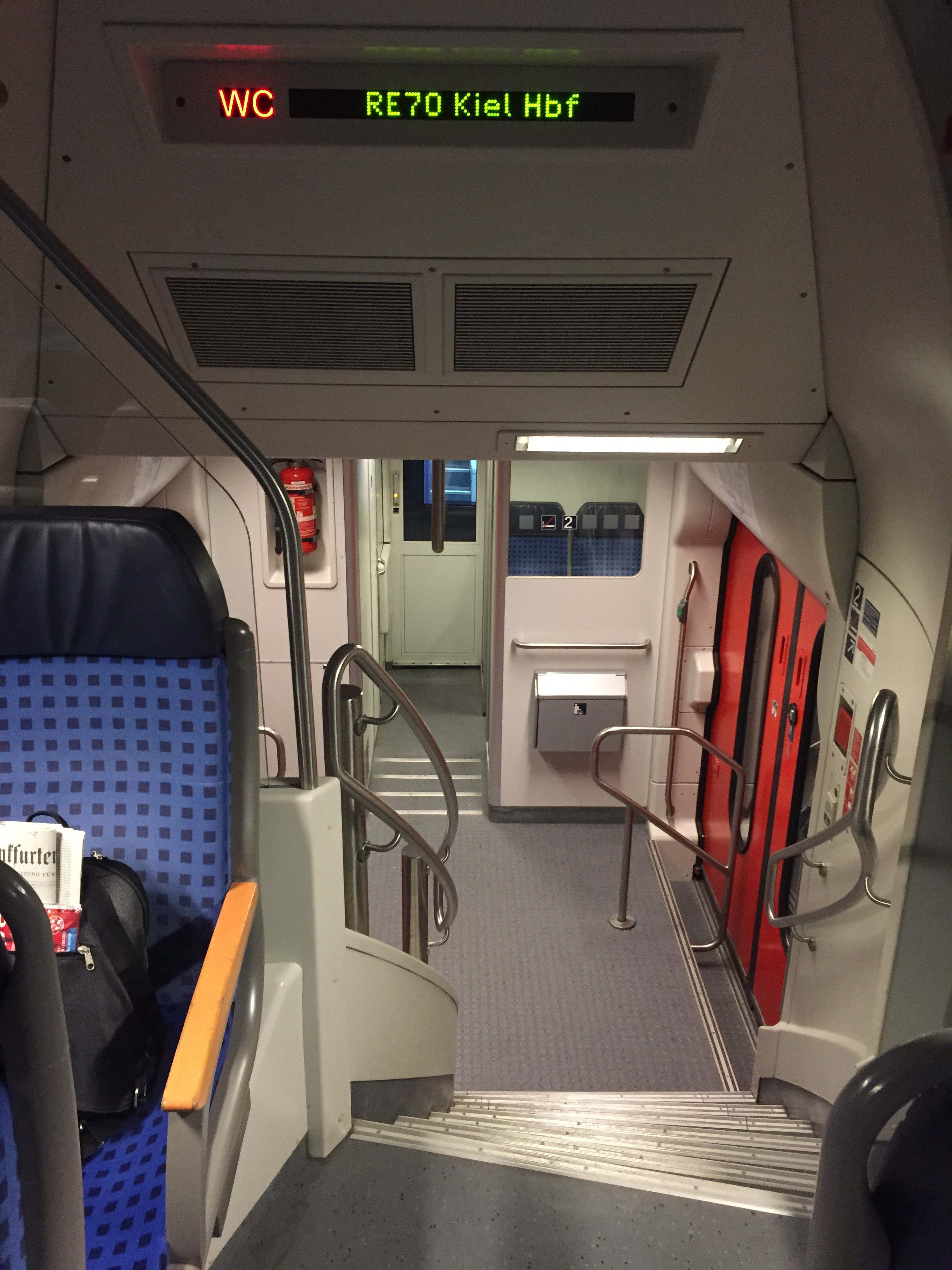 Regionalexpress Innenansicht